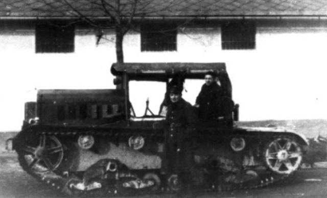 Jedno z nielicznych zdjęć drugiego prototypu ciągnika C6T (z silnikiem umieszczonym z przodu a kołami napędowymi z tyłu) do budowy którego użyto niektórych elementów samochodu ciężarowego Saurer. Fotografię wykonano w początkach 1934 roku bowiem po zakończeniu prób ciągnik został generalnie przebudowany i zmnienił wygląd zewnętrzny, upodabniając się do pierwszego prototypu. Po przebudowie oznaczenie prototypu zmieniono na C6P/II, potem na C7P/II. [opis oryginalny]